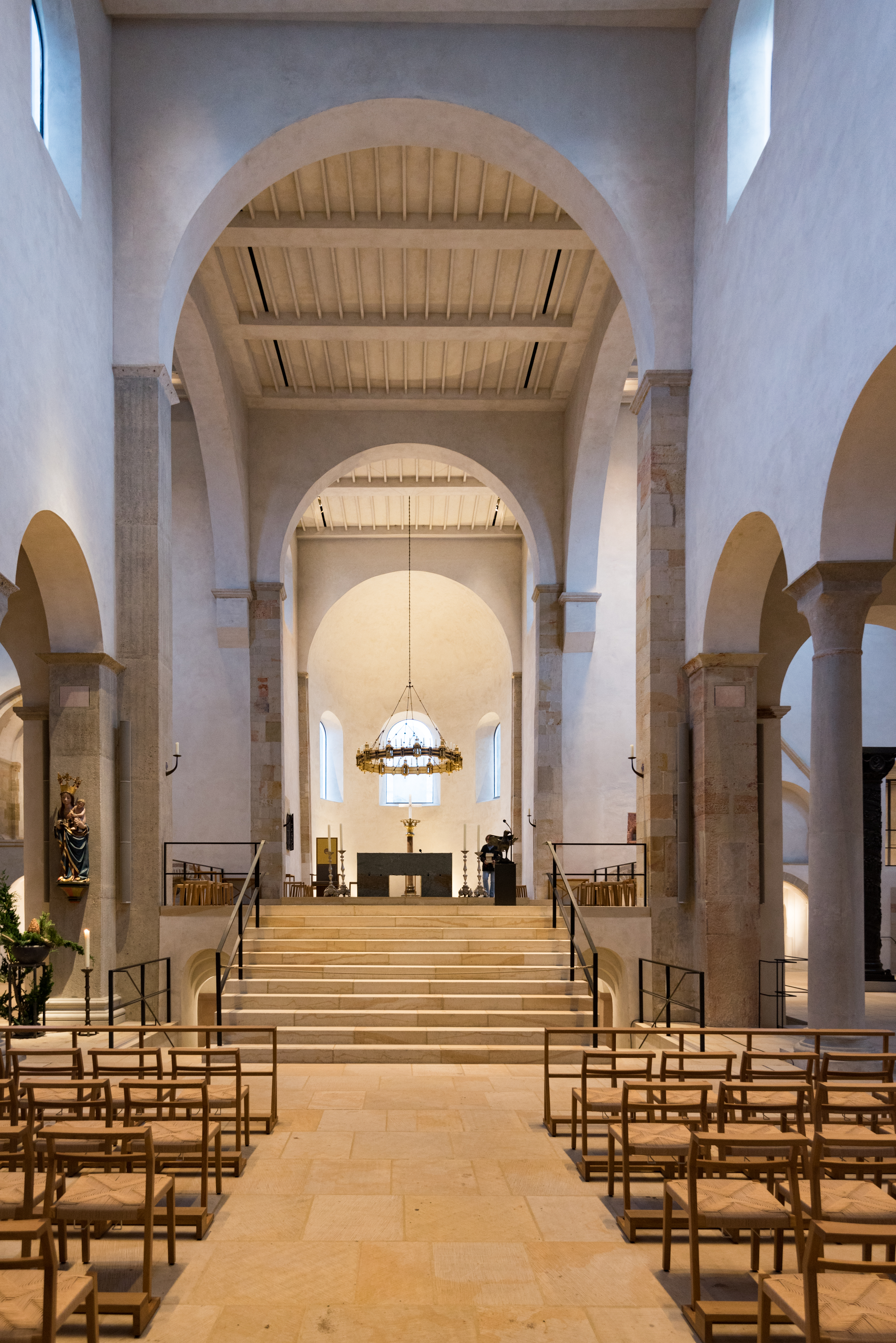 Hildesheim, Domhof, Dom, Langhaus von Westen